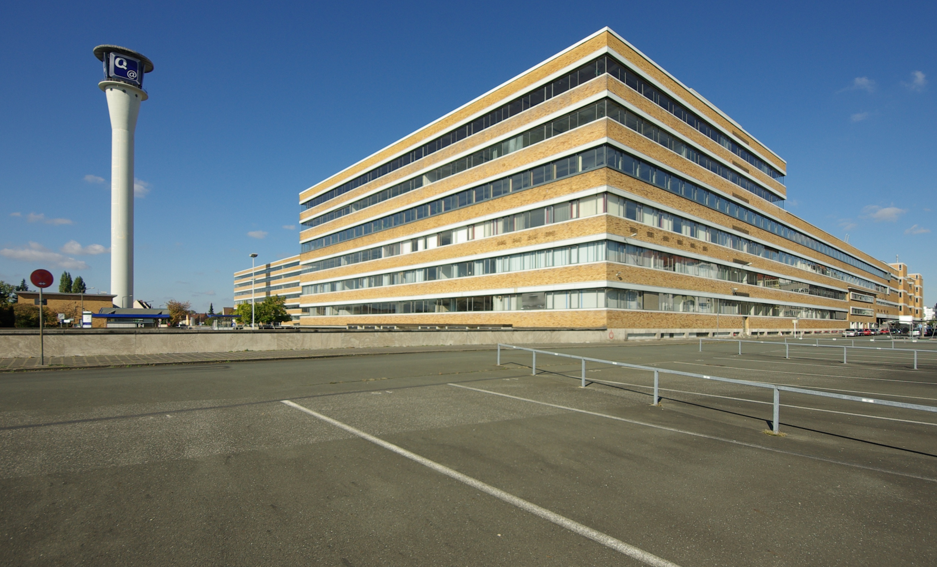 Großversandhaus der ehemaligen Quelle GmbH im Nürnberger Stadtteil Eberhardshof. Links der Quelleturm.